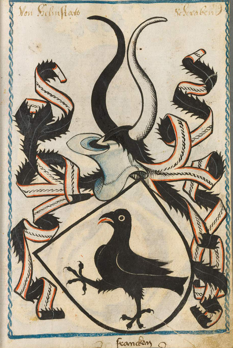 Scheibler'sches Wappenbuch , älterer Teil Helmstadt